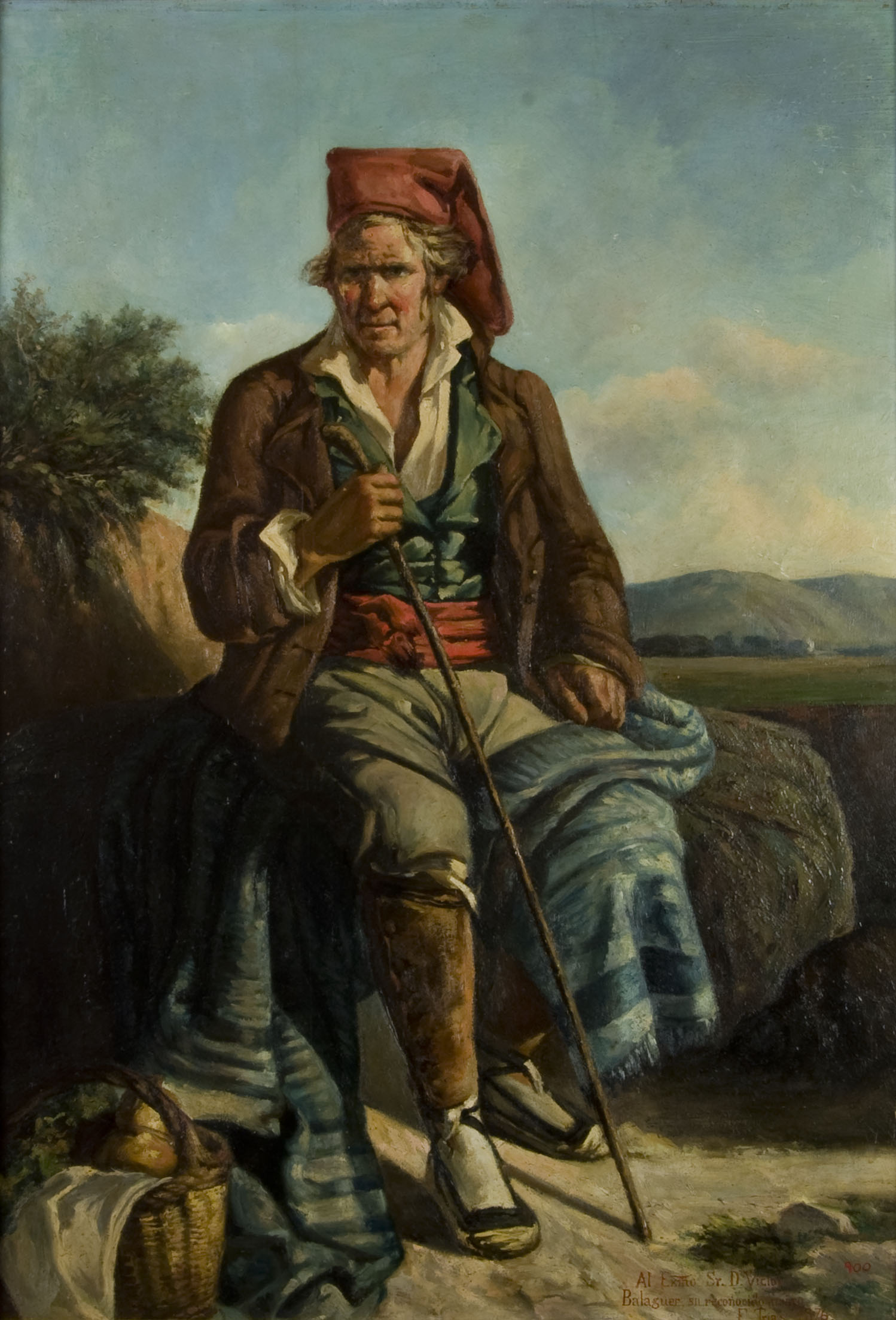 Retrat d'un personatge vestit a la manera tradicional catalana amb faixes, espardenyes i barretina que, assegut sobre un roc, reposa amb el bastó a la mà. Té una manta sobre la qual esta assegut i que a la vegada li cobreix parcialment la cama esquerra. Té un cabàs amb aliments a la part inferior dreta del quadre. L'escena és a l'aire lliure en un entorn rural, al fons veiem una esplanada i muntanyes. Veiem un celatge blau, per la llum, podria tractar-se del migdia. Juga amb les llums i ombres, com es pot veure, sobretot, amb la roca de darrere el pagès